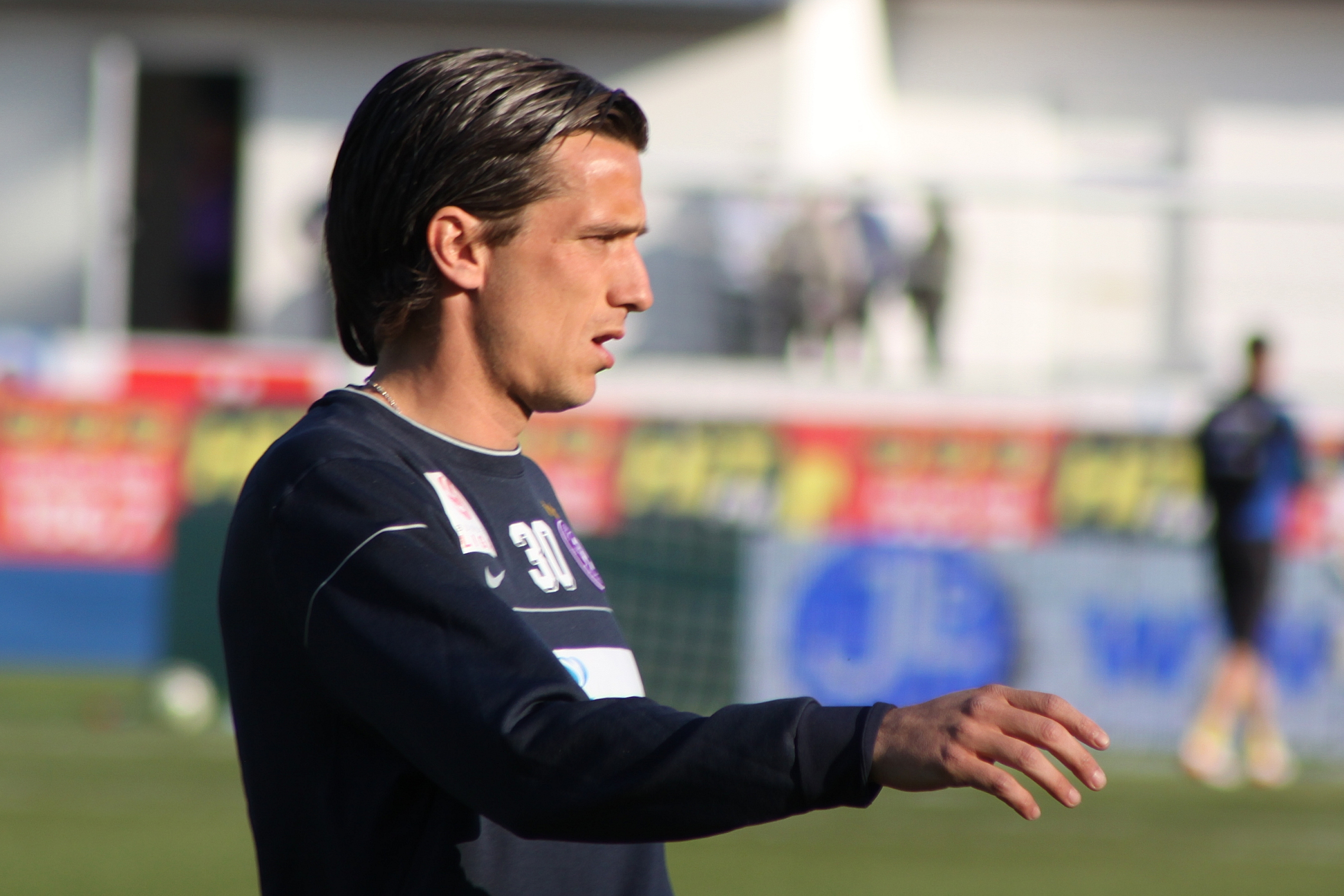 Milenko Acimovic - FK Austria Wien